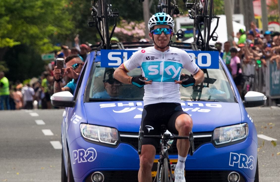 Sergio Luis Henao, ingresando a meta en el Campeonato Nacional de Ruta Colombia 2018